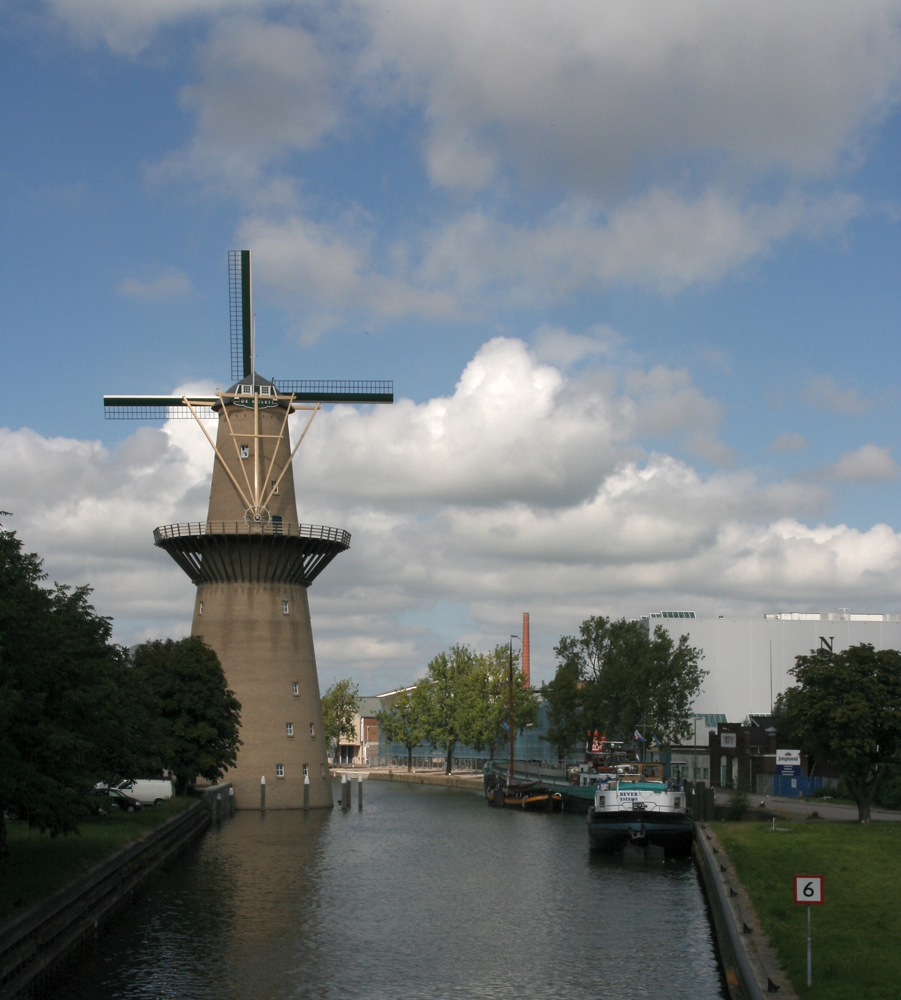 Schiedam: Windmolen Nolet